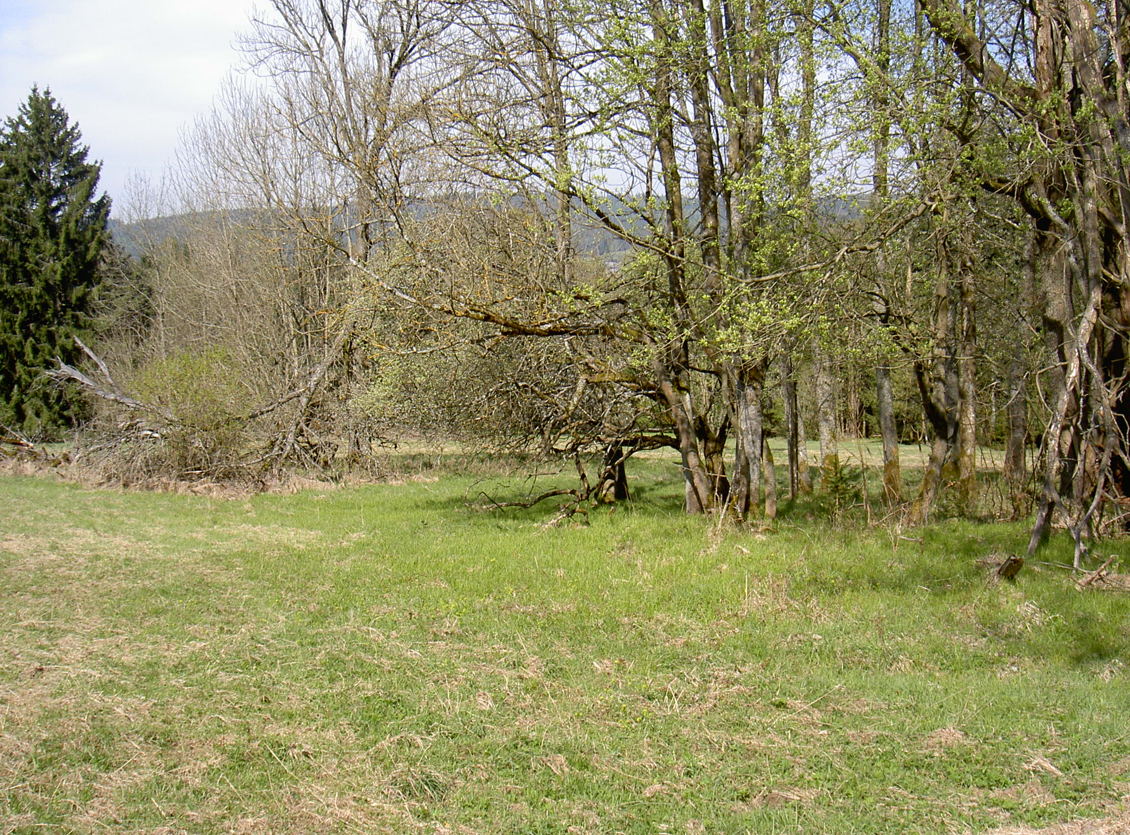 Oberhütten